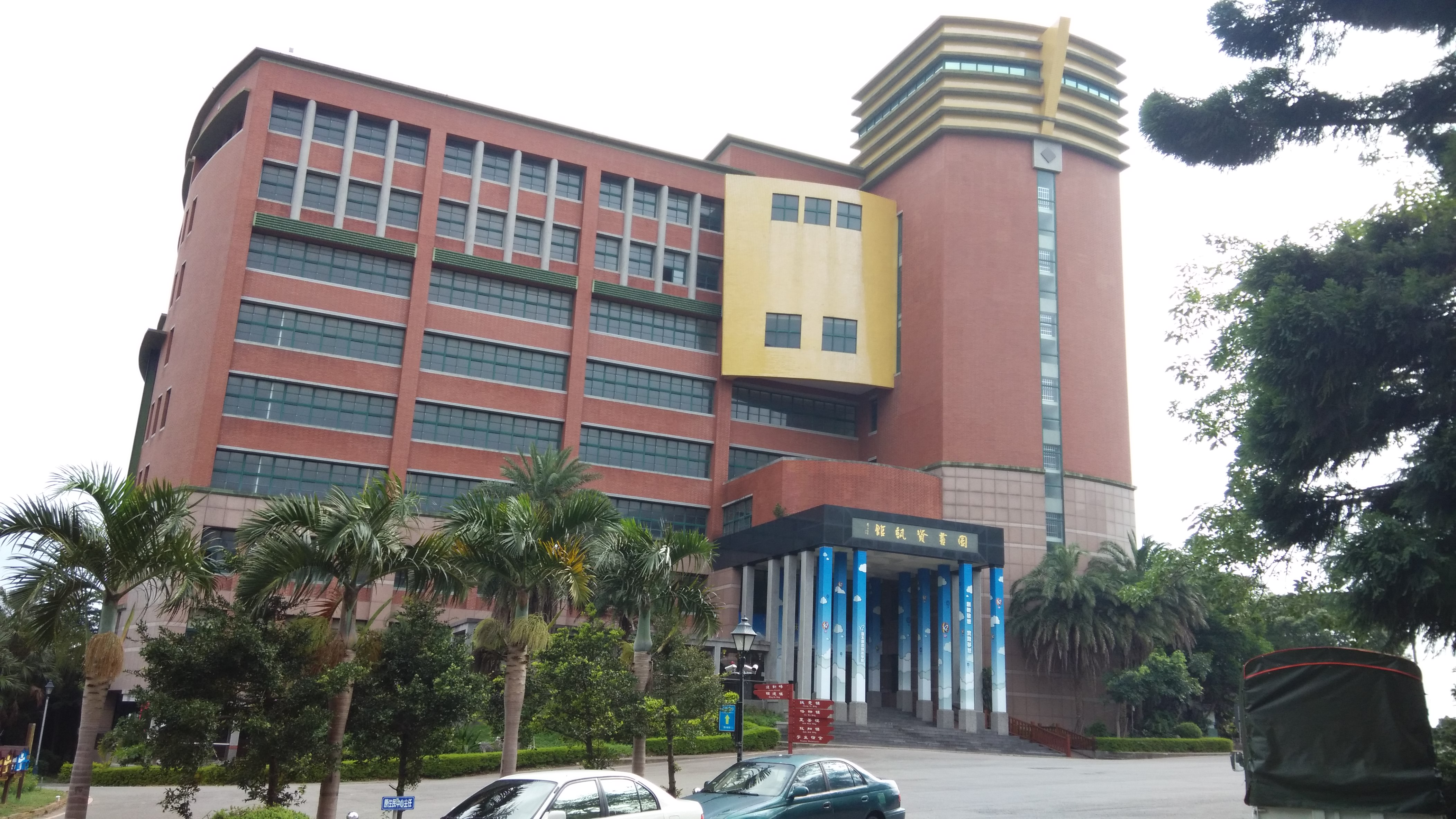 中文（台灣）: 亞太創意技術學院圖書資訊館